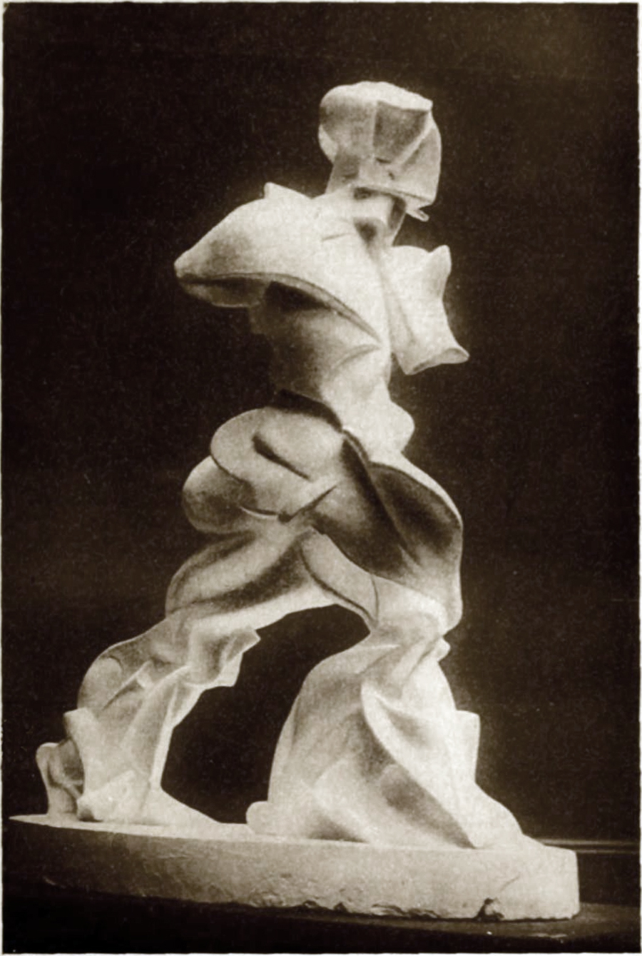 Umberto Boccioni, Spiralförmige ausdehnung von muskeln in bewegung, plaster, photograph published in 1913.